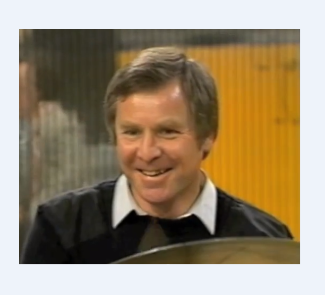 Foto zoals deze op de rouwkaart is gebruikt